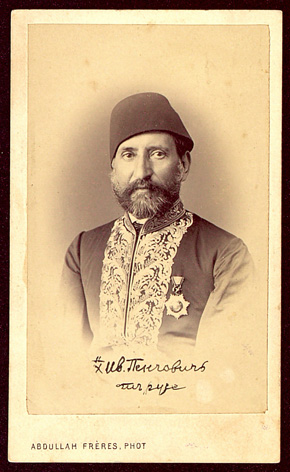 Иванчо Хаджипенчович .